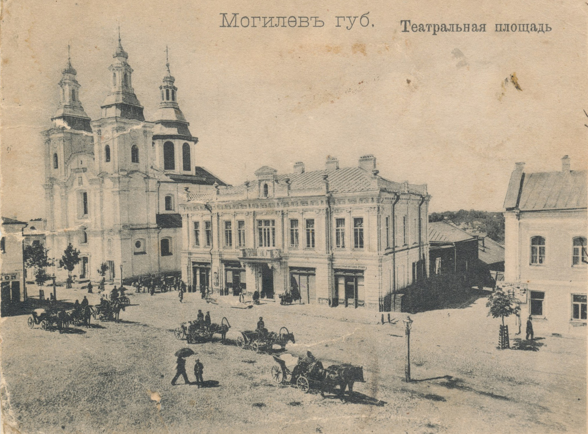 Беларуская (тарашкевіца): Магілёў (Mahiloŭ), рог пляцу Тэатральнага (plac Teatralny) і вуліцы Шклоўскай (vulica Škłoŭskaja). Касьцёл Сьвятога Францішка Ксавэрыя і Анёлаў-Ахоўнікаў і калегіюм езуітаў